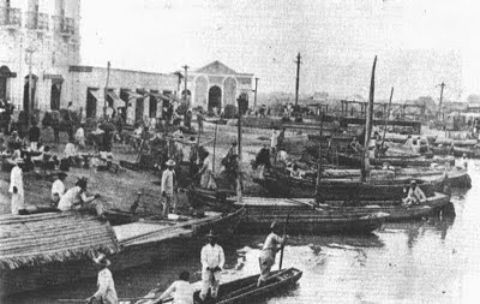 Piraguas en el malecón de la ciudad de Maracaibo, Venezuela. Al fondo se aprecia el edifico que servía de sede a la Aduana del puerto, a mediados del siglo XIX.